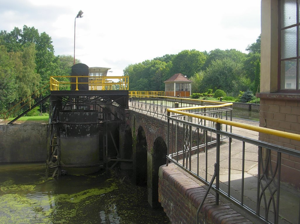 Śluza Okole na Kanale Bydgoskim - zbiornik oszczędnościowy